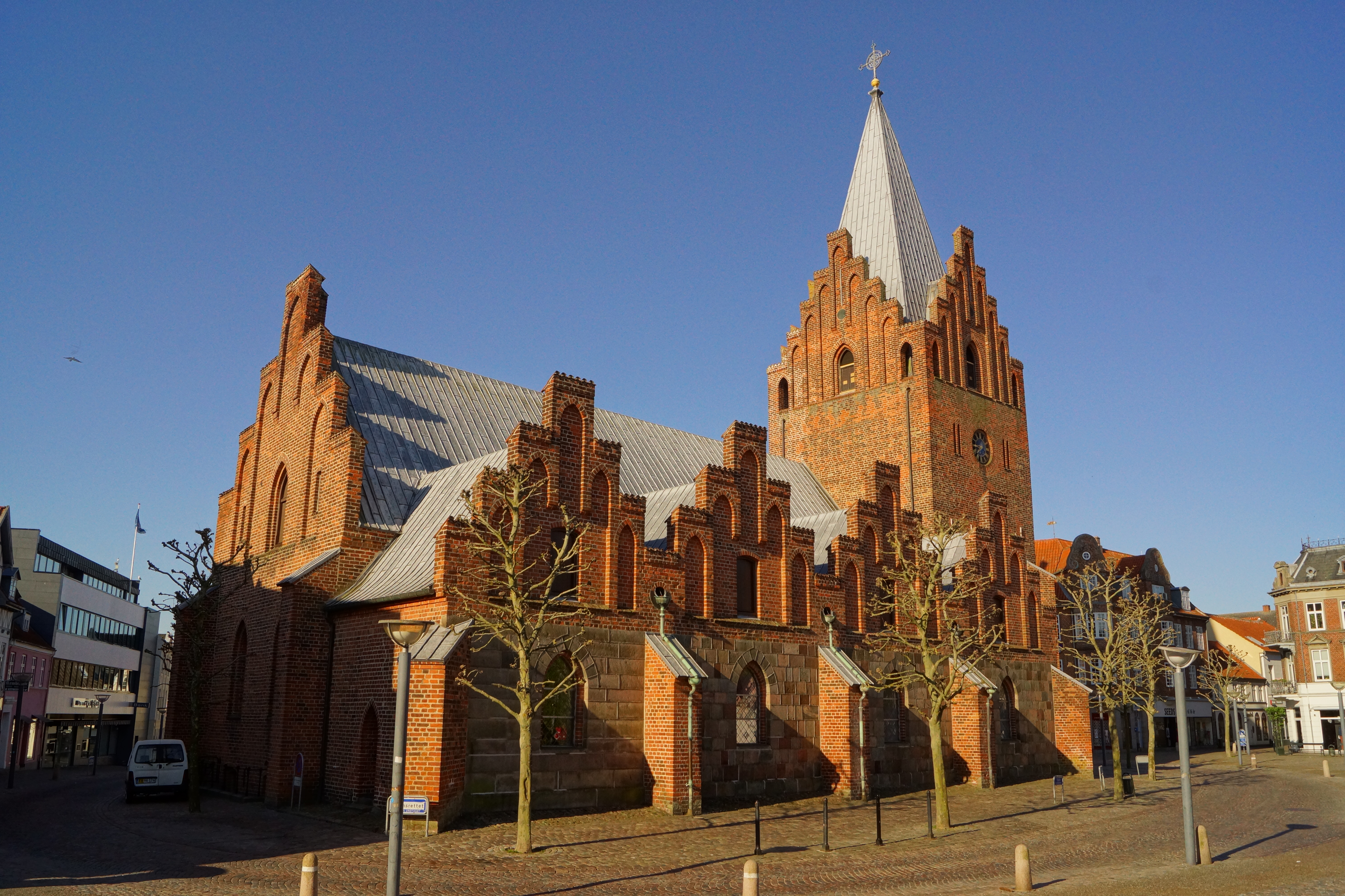 Grenå Kirke